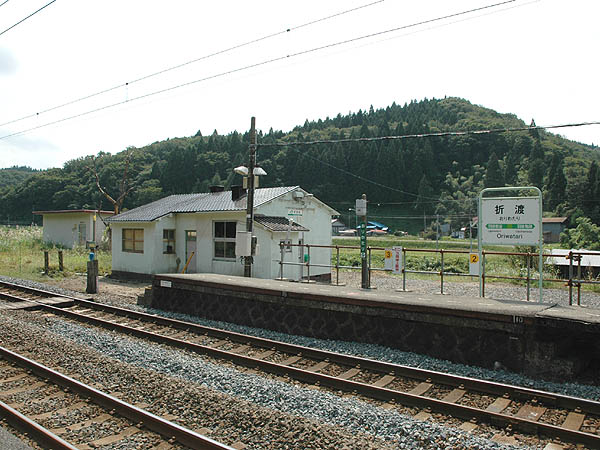 Oriwatari Station, on Uetsu Main Line, Yurihonjō, Akita, Japan